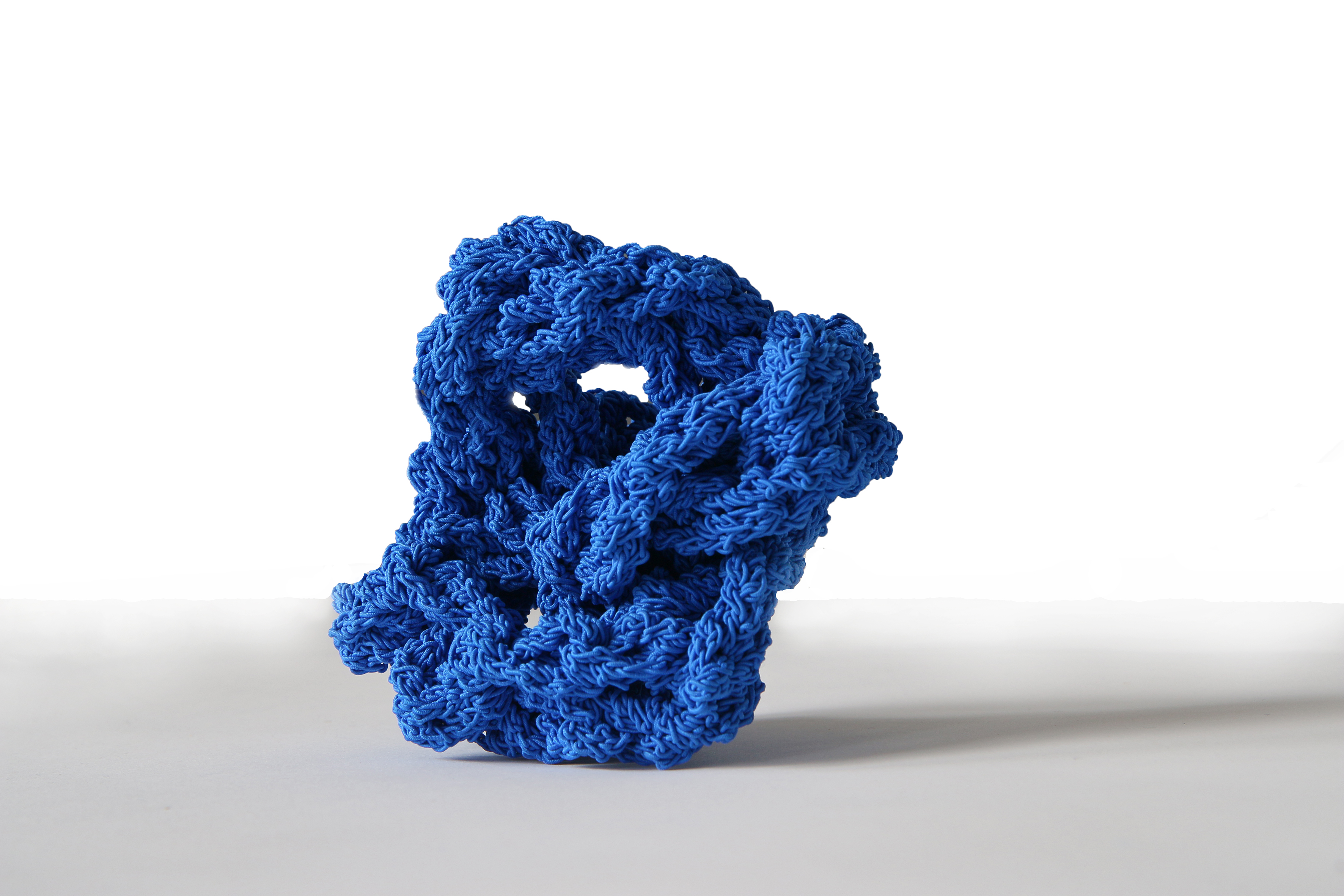 ruimtelijk kunstwerk